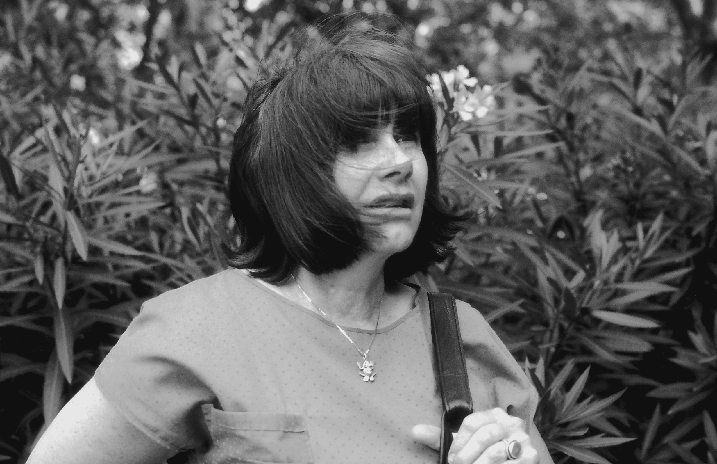 Marta Traba, crítica de arte en 1981.